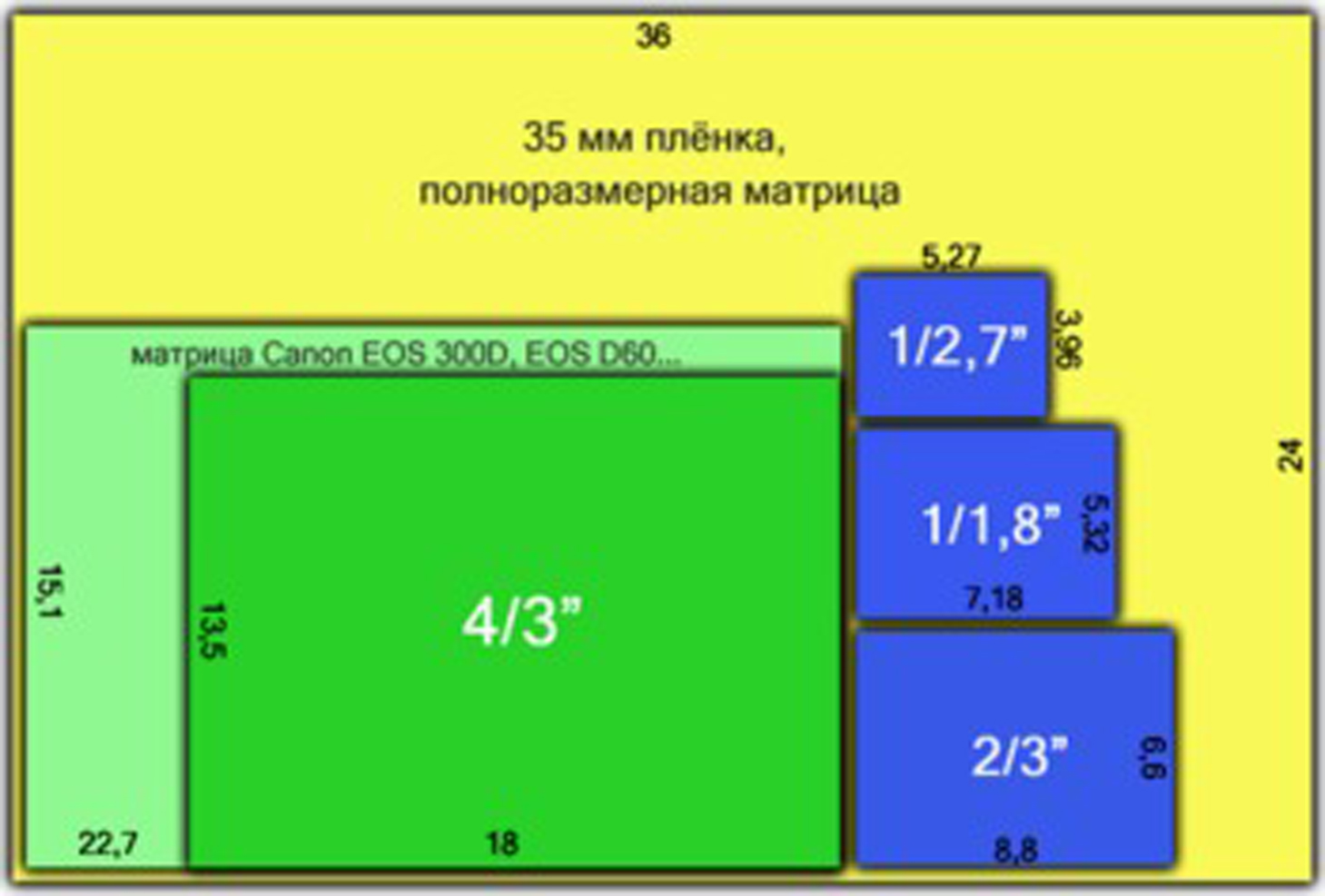 Матрицы